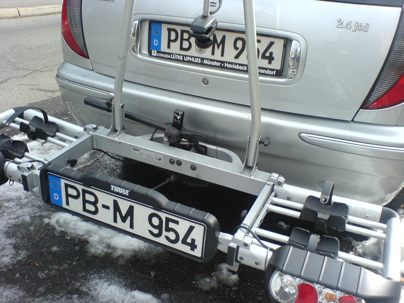 Deutsches Wiederholungskennzeichen und Original (Fahrradheckträger, Paderborn).